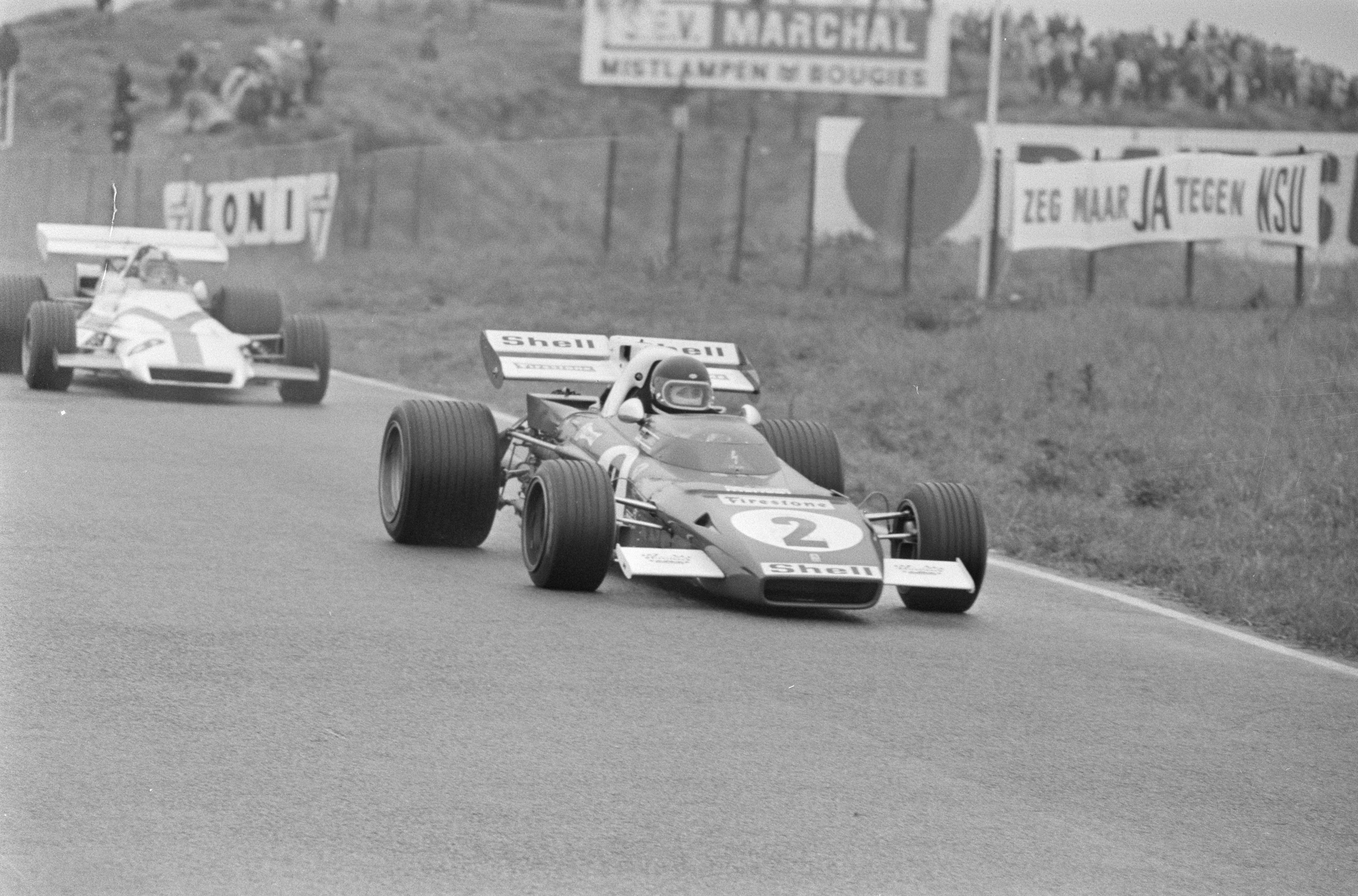 Collectie / Archief : Fotocollectie Anefo Reportage / Serie : Grote Prijs van Nederland Formule I wagen, Zandvoort Beschrijving : Jacky Ickx (r) en Pedro Rodriguez Datum : 20 juni 1971 Locatie : Noord-Holland, Zandvoort Trefwoorden : autosport, circuits, raceauto's, races, wedstrijden Persoonsnaam : Ickx, Jacky, Rodriguez, Pedro Fotograaf : Fotograaf Onbekend / Anefo, [onbekend] Auteursrechthebbende : Nationaal Archief Materiaalsoort : Negatief (zwart/wit) Nummer archiefinventaris : bekijk toegang 2.24.01.05 Bestanddeelnummer : 924-6668